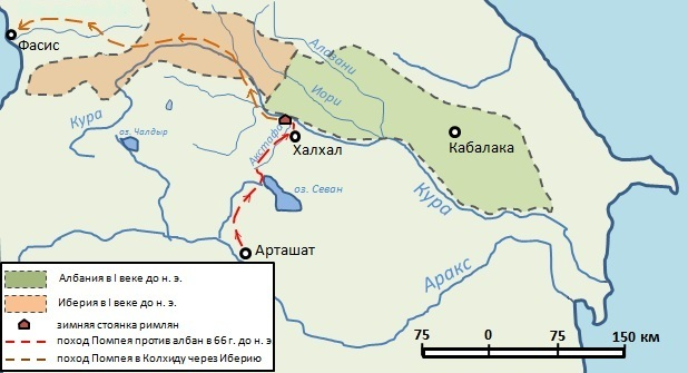 Первый поход Помпея к границам Албании в 66 году до н. э. и оттуда в Колхиду. Карта создана на основе карты из статьи Ю. Джафарова "О локализации храмовой области в Кавказской Албании" (Вестник древней истории, 1985. № 2, с. 98) и карты "Закавказье во II-I вв. до н.э." из II тома "Всемирной истории" (1956).